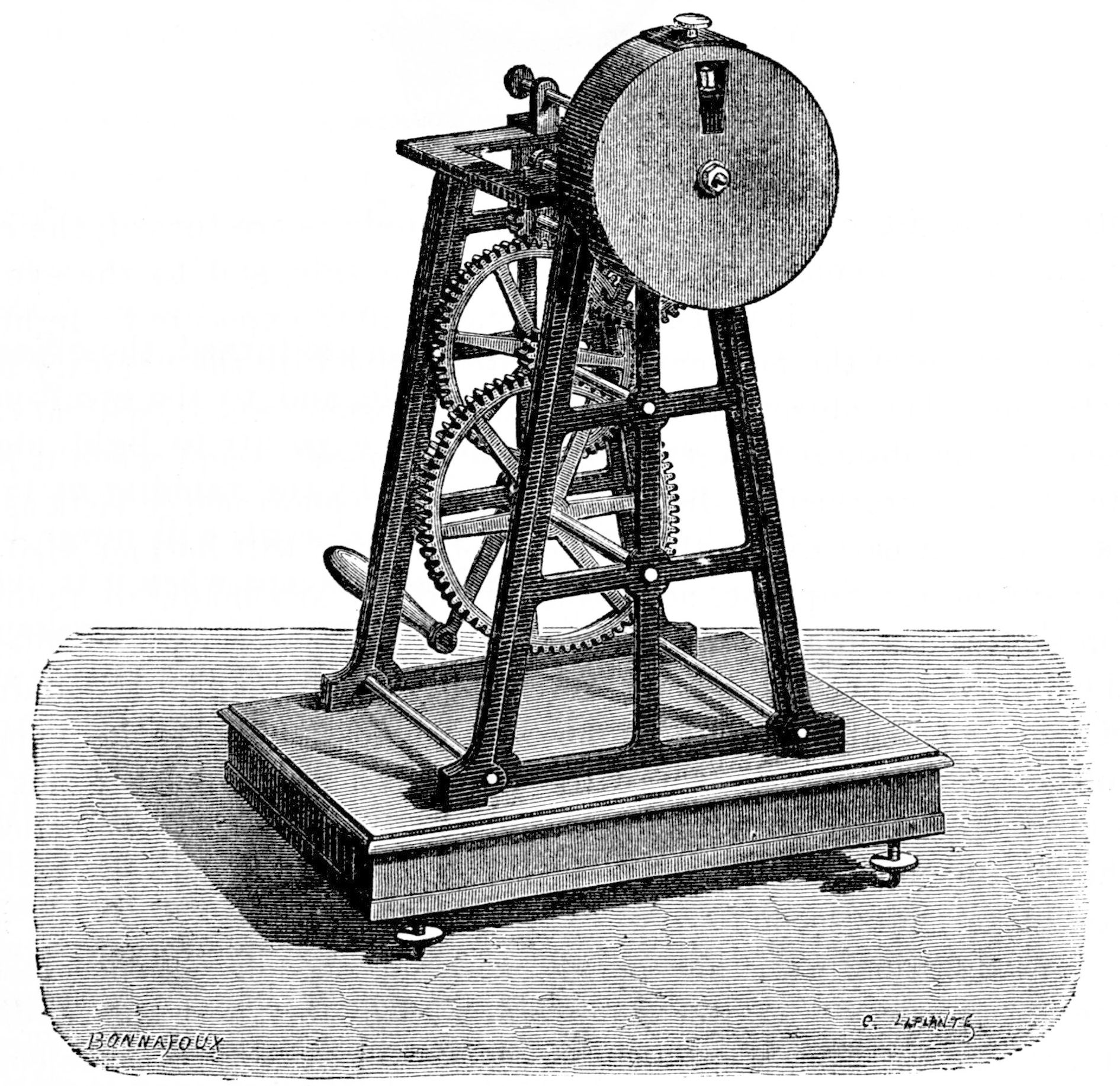 Becquerel phosphoroscope